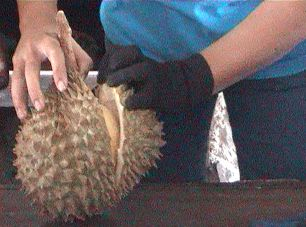 Öffnen einer Durian auf einem Markt in Thailand